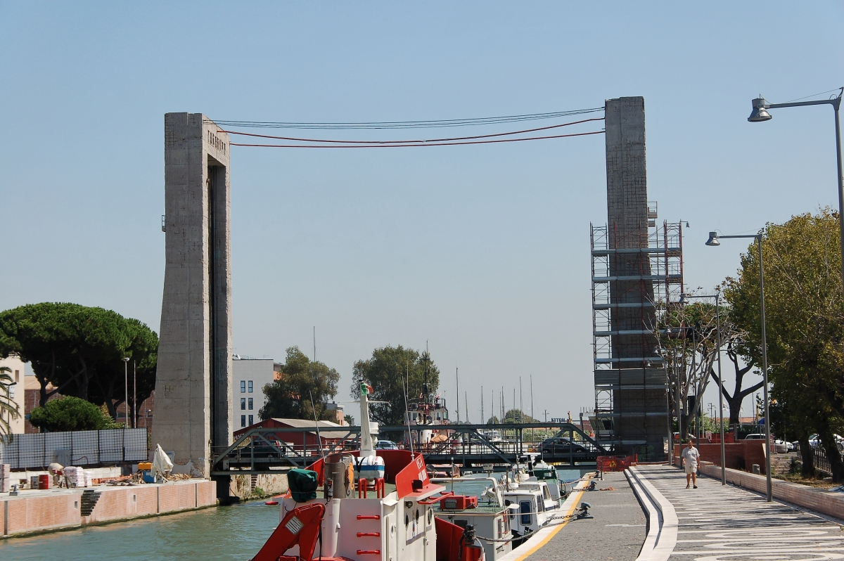 Fiumicino 2011 Durch die Übernahme der UMTS Kosten durch den gemeinnützigen Vereins Skillshare.eu konnte dieses Bild bereitstellen werden. Skillshare e.V. ist ein eingetragener gemeinnütziger Verein zur Förderung der Bildung durch Unterstützung der Erstellung, Sammlung und Verbreitung so genannten freien Wissens. IBAN: DE16 8306 5408 0004 8850 66 BIC: GENODEF1SLR Bank: VR-Bank Altenburger Land